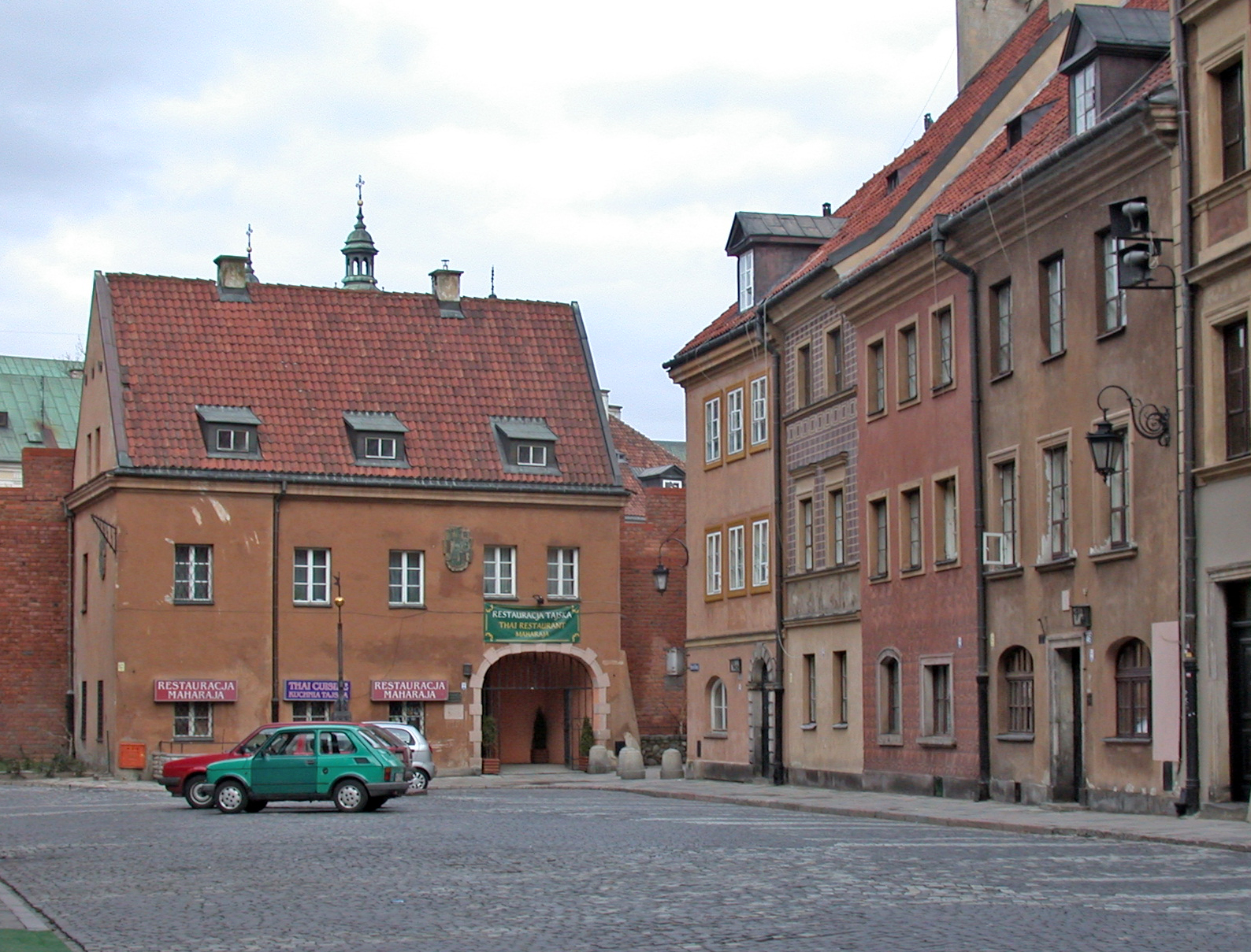 Varsavia, via Dunaj Larga (Szeroki Dunaj).